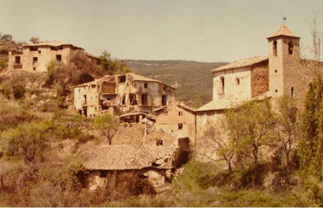 Suelves. Barrio de la Iglesia. En el centro, medio caída, Casa Cereza.